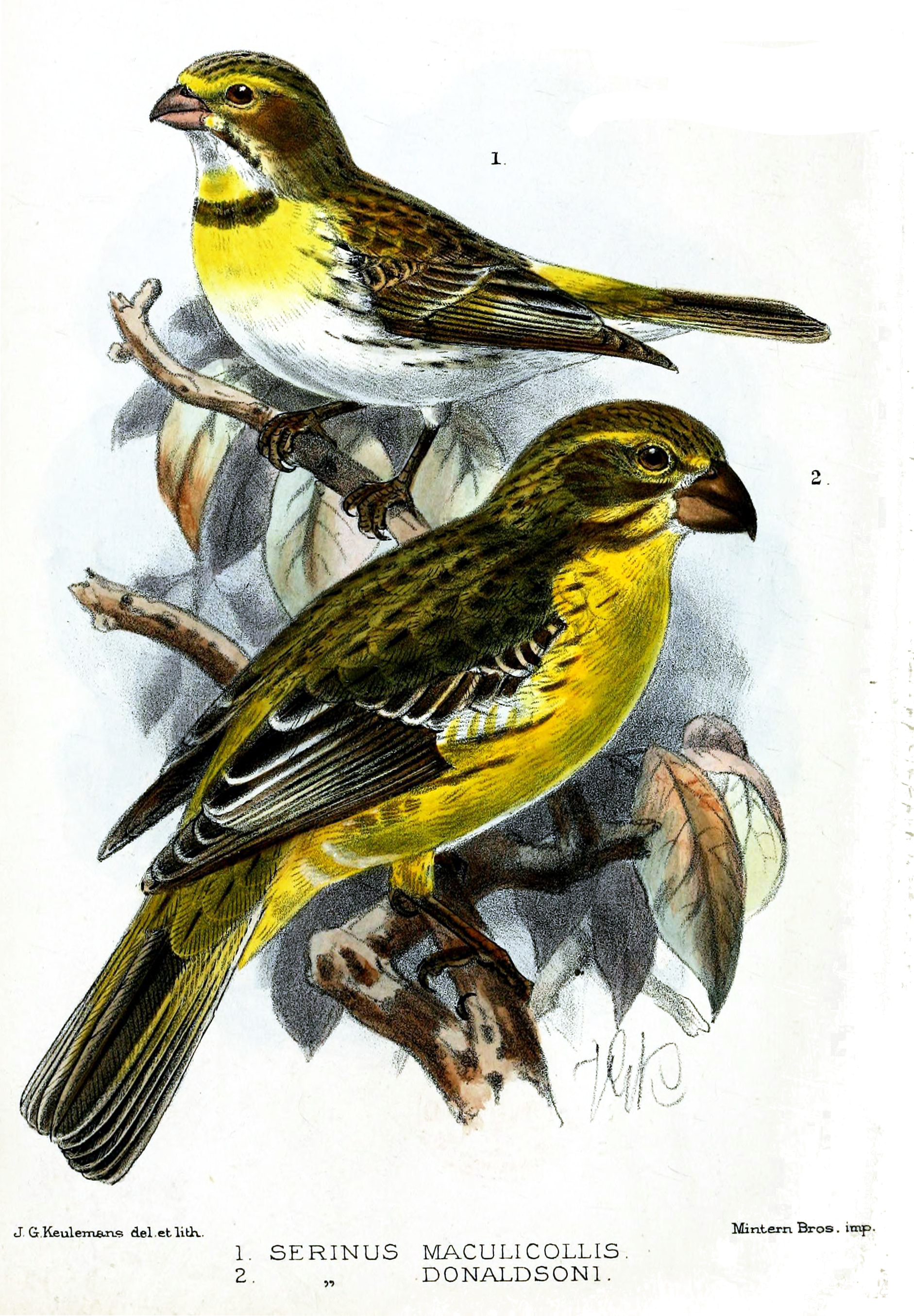 Serinus dorsostriatus maculicollis & Serinus donaldsoni